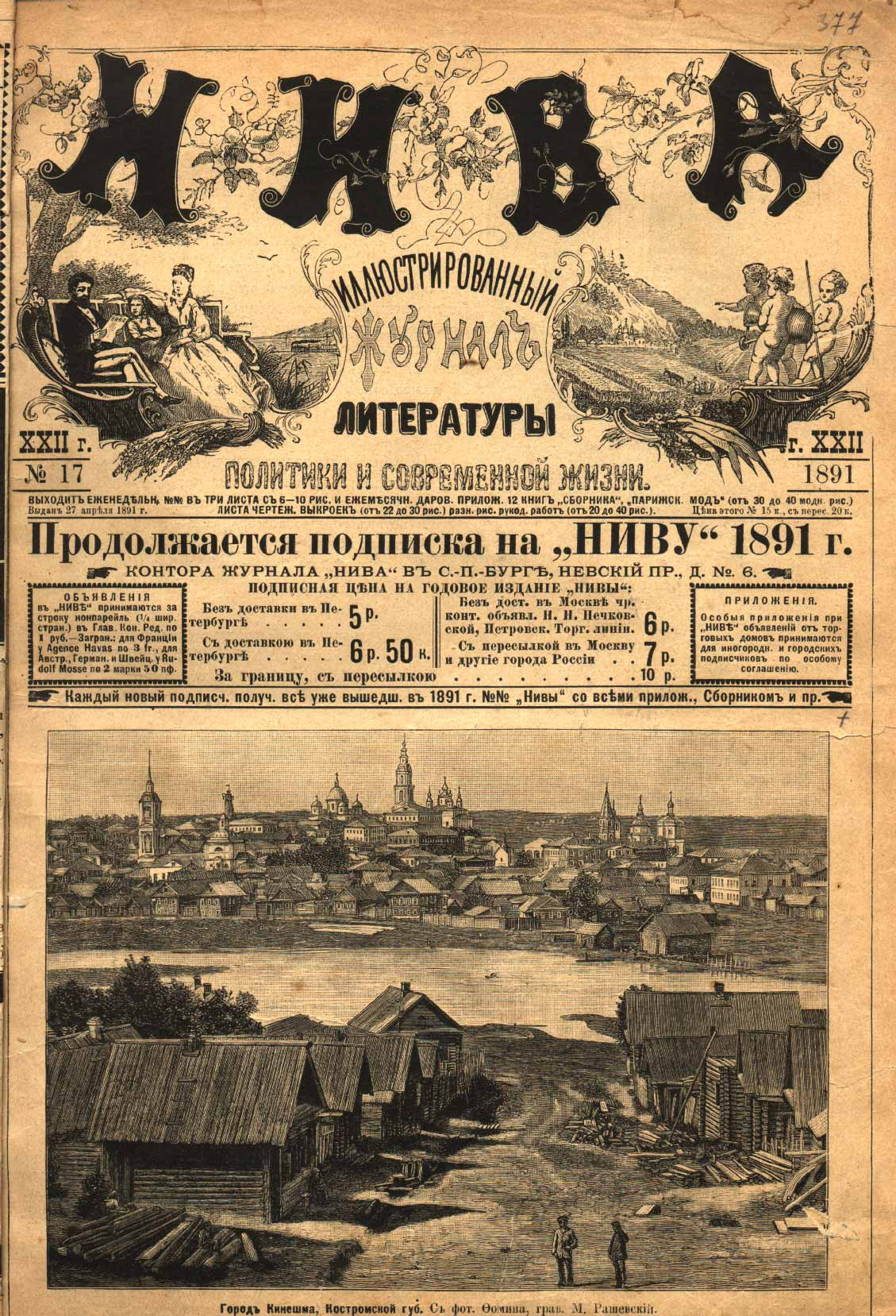 Журнал Нива Первая страница журнала "Нива" №17 1891 г